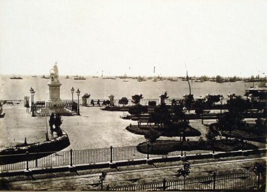 Vista de la Plaza Mazzini (hoy Plaza Roma) y el monumento a Giuseppe Mazzini inaugurado en 1878, desde el Paseo de Julio (hoy Avenida Leandro N. Alem). En el borde inferior de la foto, las vías del Ferrocarril del Norte de Buenos Aires que partía desde Plaza de Mayo (actual Ferrocarril Bartolomé Mitre).